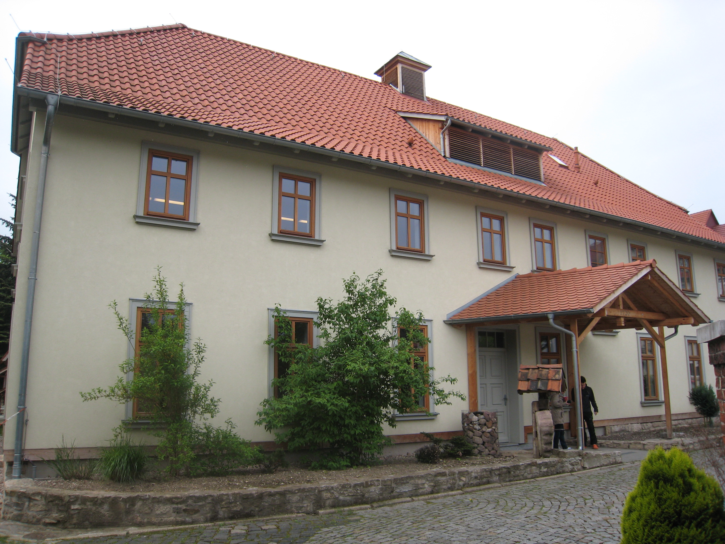 Ehemalige Försterei in Arnstadt, Bahnhofstraße 21.